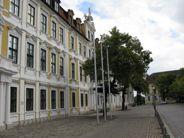 Der Landtag Sachsen-Anhalt , Domplatz, Magdeburg (The Landtag or state parliament for Saxony-Anhalt)